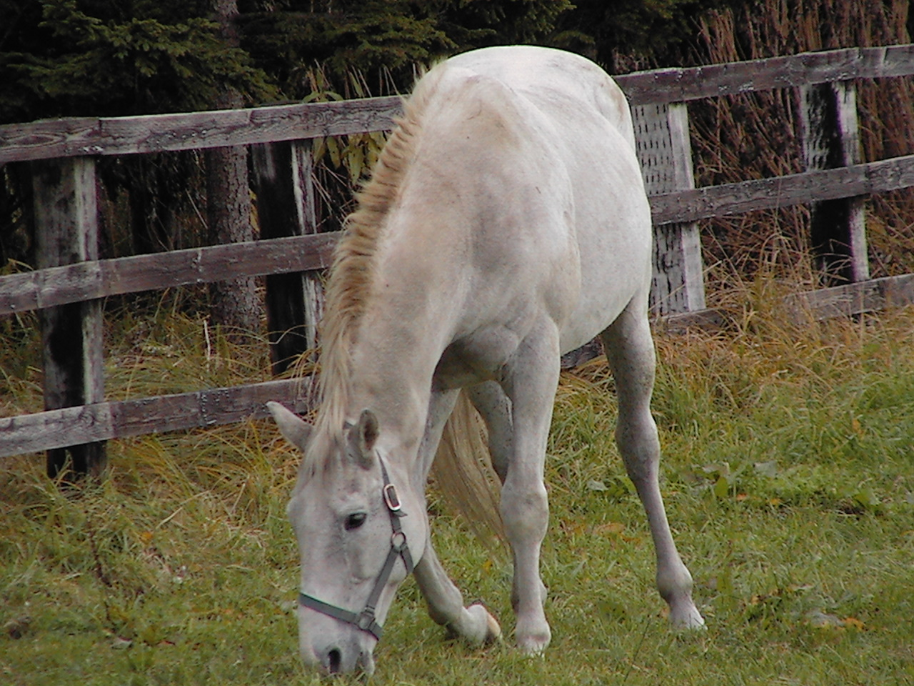 日西牧場にて撮影